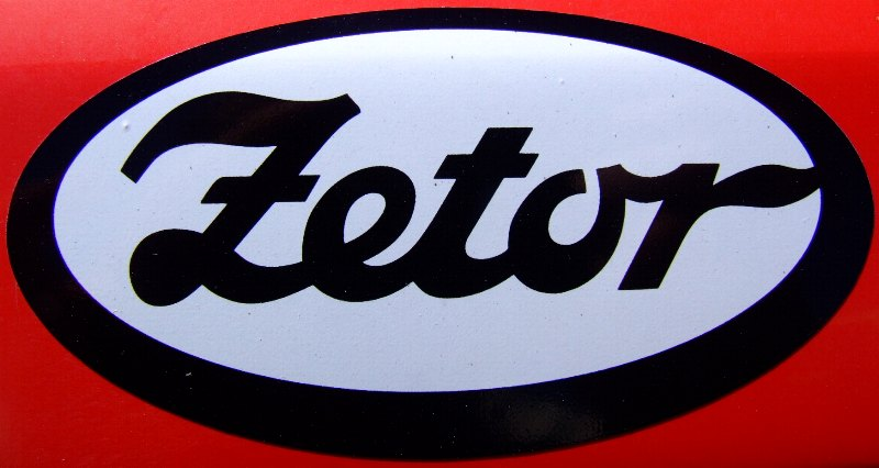 Logo an einem älteren Zetor-Traktor